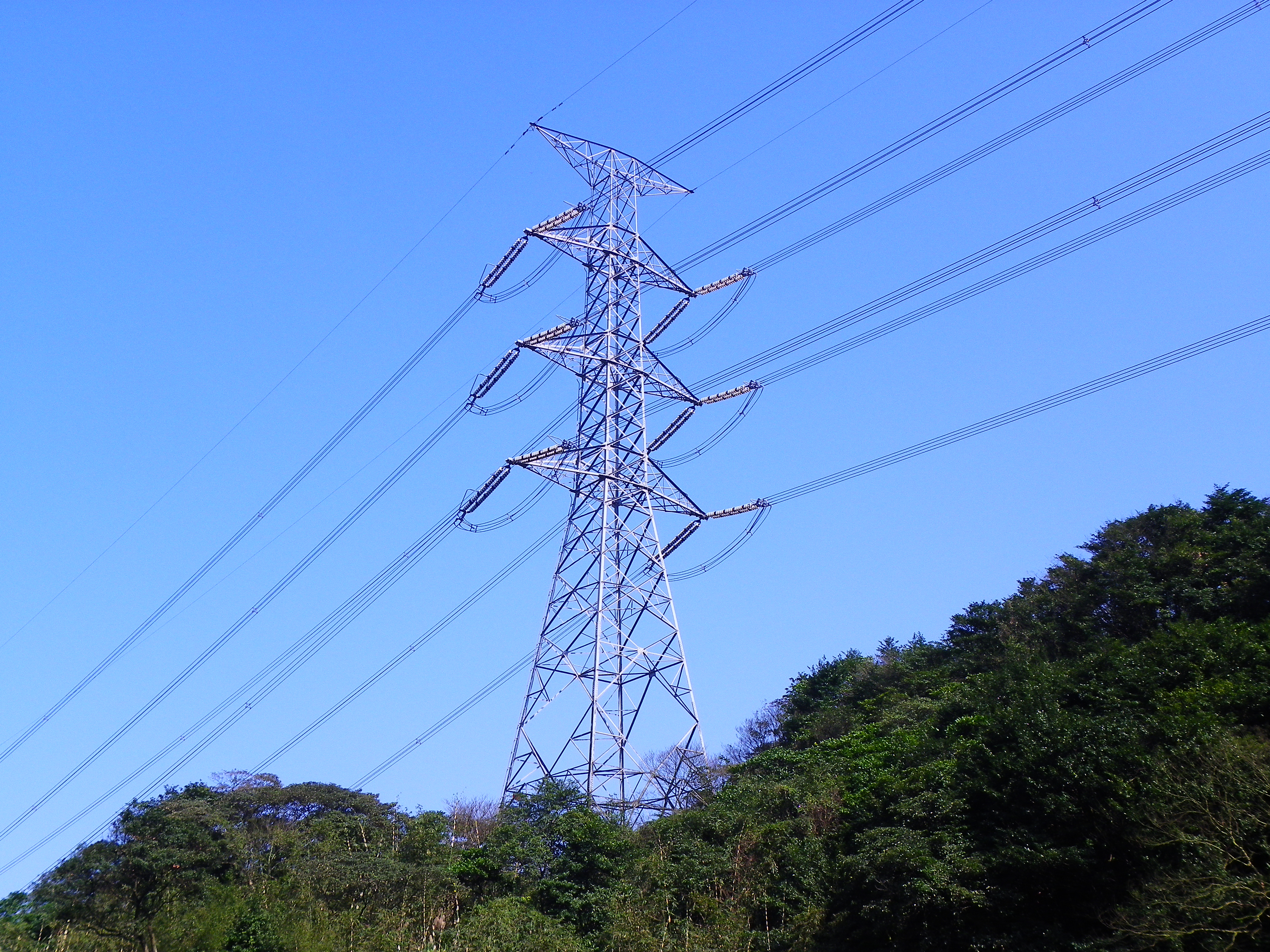 臺灣省基隆市安樂區萬瑞線公路一號隧道北端出口丘陵上的高壓電塔。